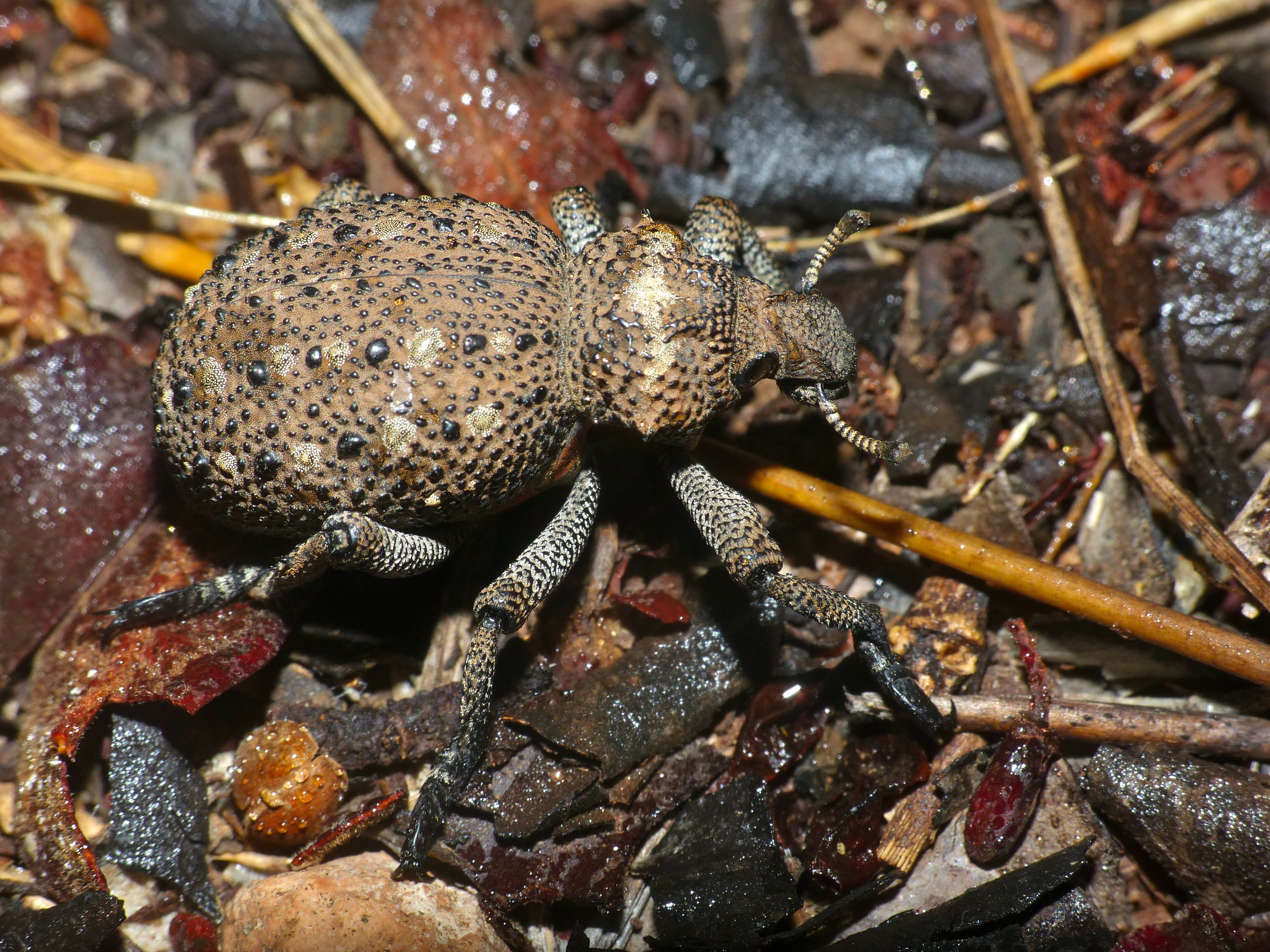 Mopani Camp, Kruger NP, SOUTH AFRICA